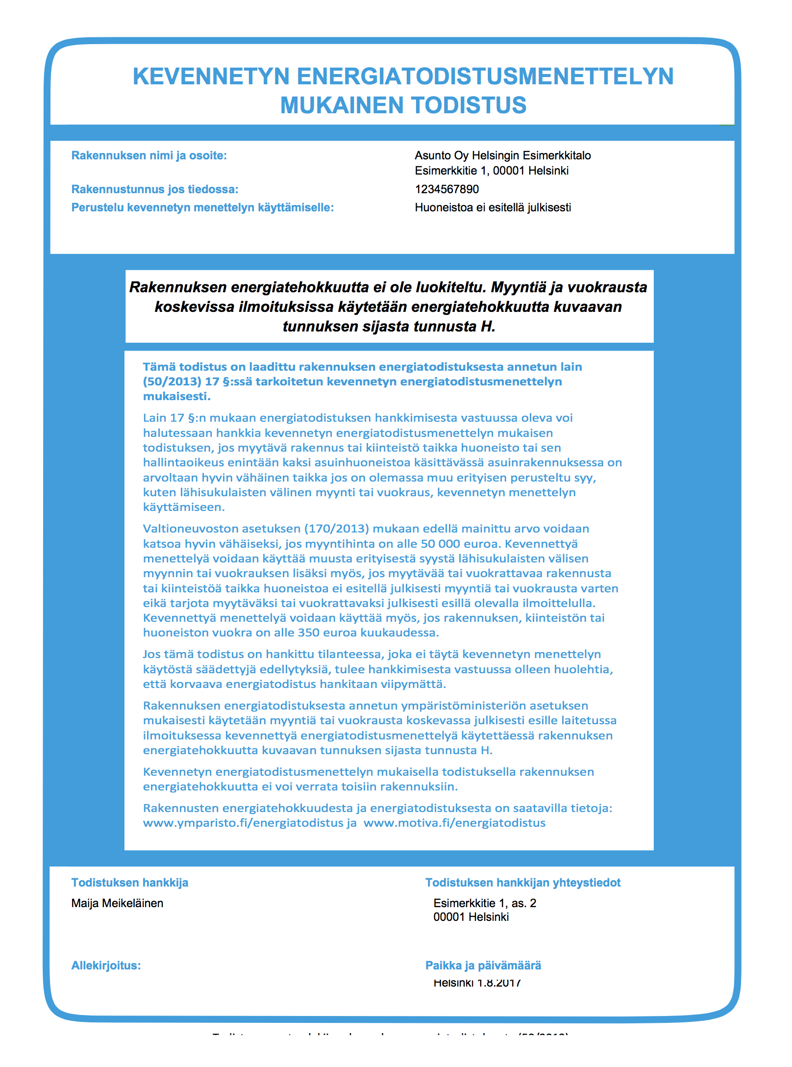 Esimerkki kevennetyn menettelyn mukaisesta energiatodistuksesta.